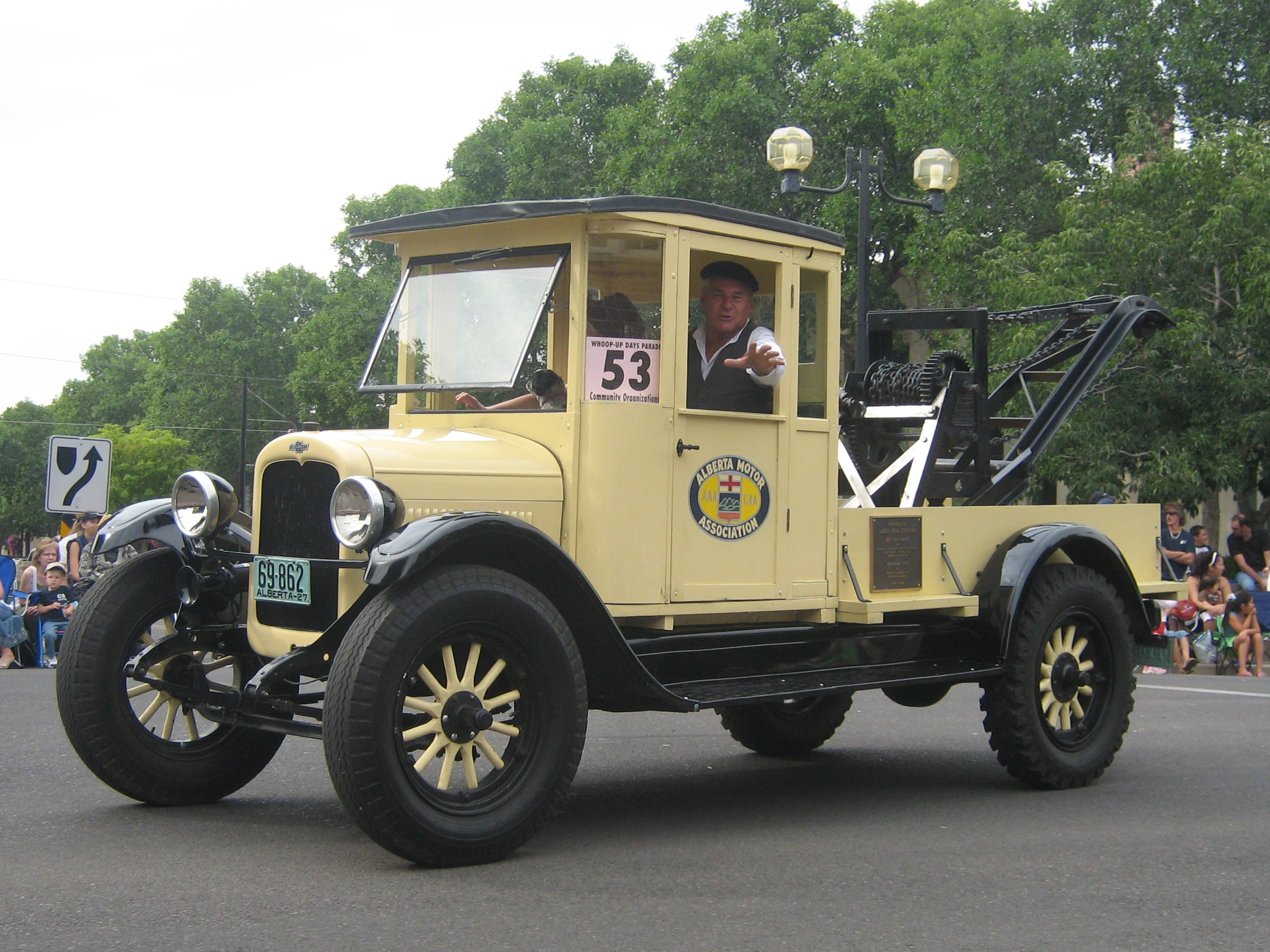 Antique Chevrolet Tow Truck